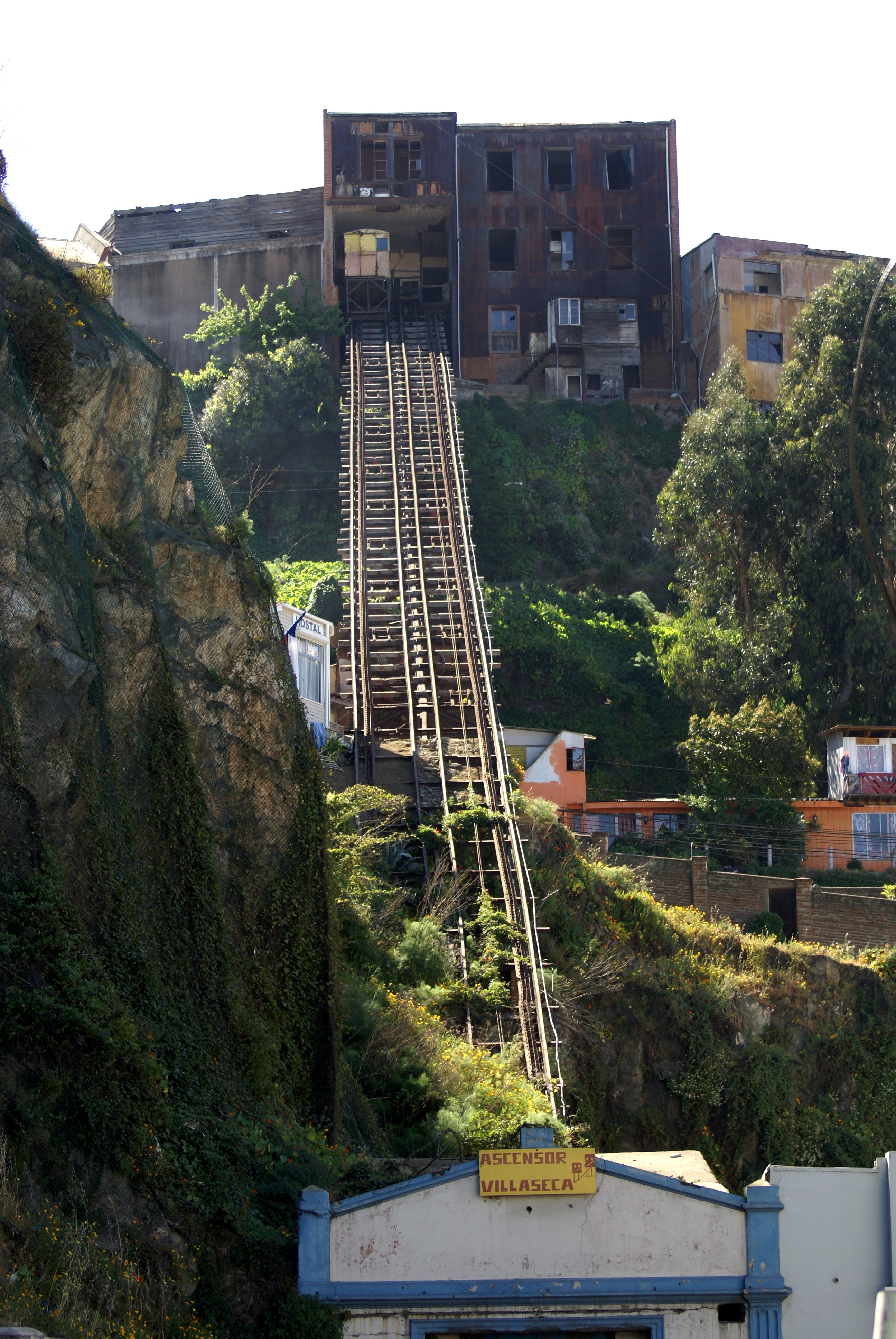 Ascensor Villaseca This is a photo of a national monument in Chile: 778